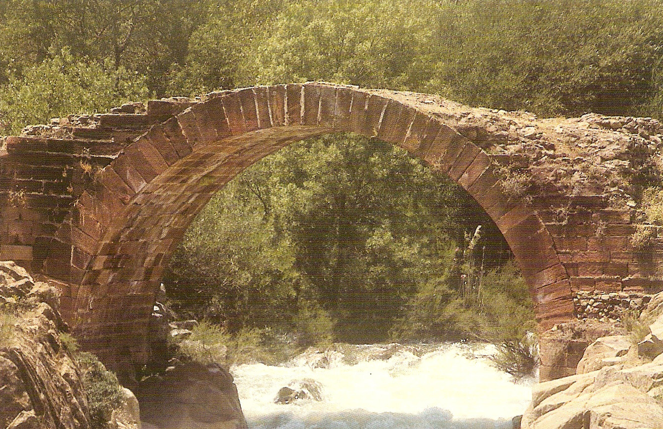 Puente Romano del Piélago (Linares, Jaén)